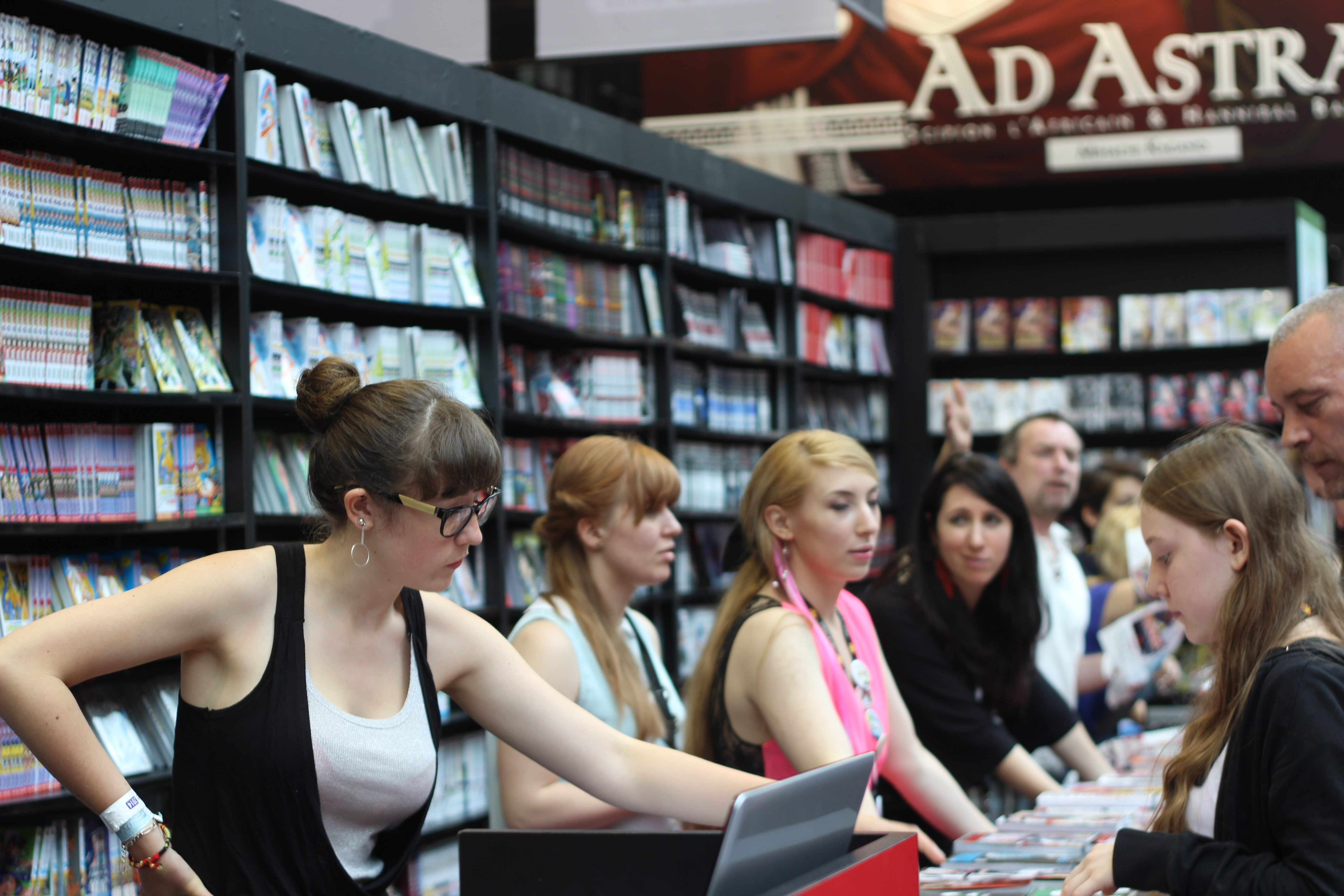 Équipe Tonkam à Japan Expo 2014 Japan Expo 2014. Parc des expositions de Paris-Nord Villepinte, Seine-Saint-Denis, France.